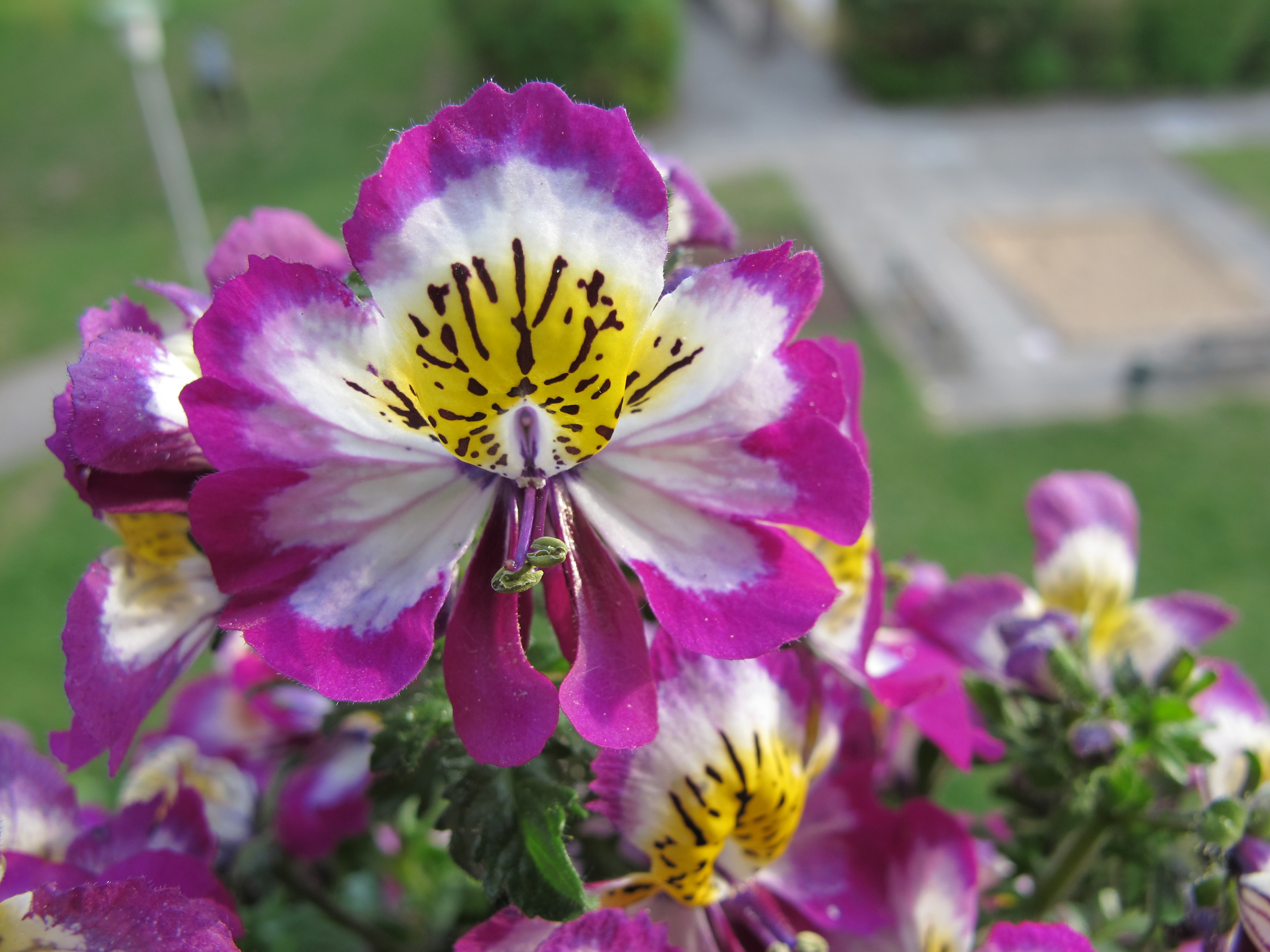 Blüte einer Bauernorchidee - Schizanthus wisetonensis